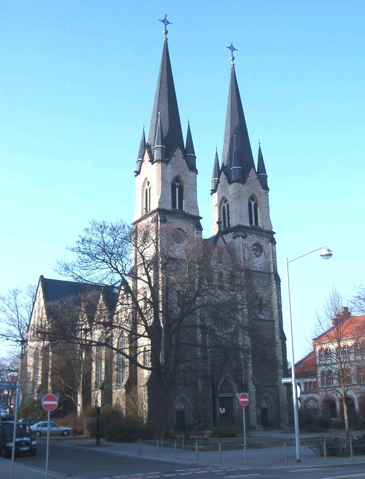 Ambrosiuskirche in Magdeburg, am 24.3.2005 selbst aufgenommen, erteilte Lizenz: GNU-FDL